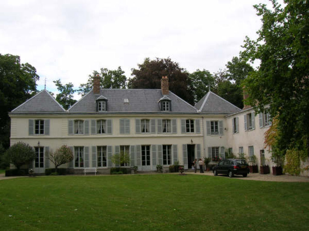 Chateau du Merle Blanc devenu la mairie d'Avrainville (91)